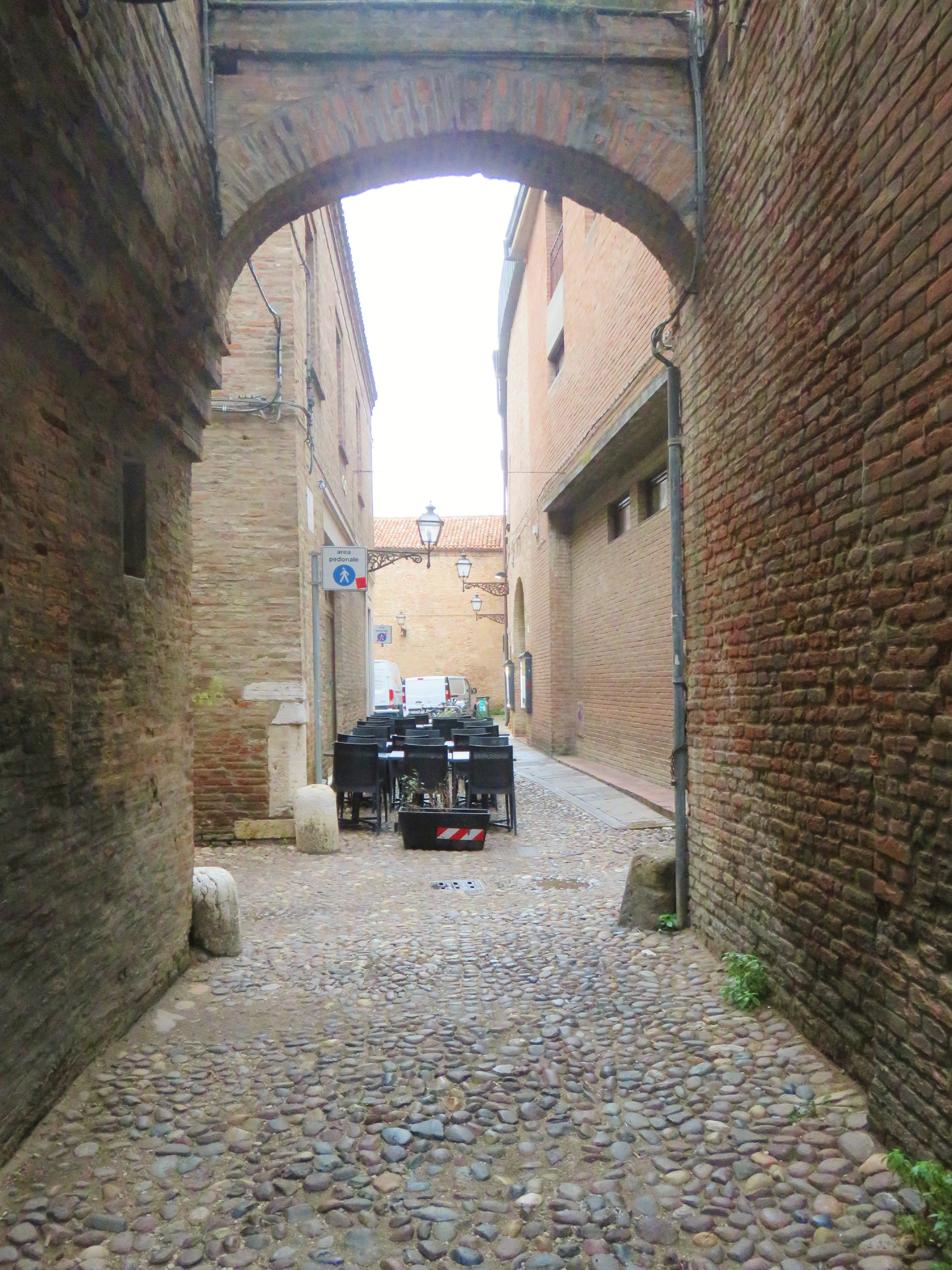 Via del Carbone all'incrocio con via delle Volte. A destra, oltre l'arco, l'edificio che ospita il multisala Apollo